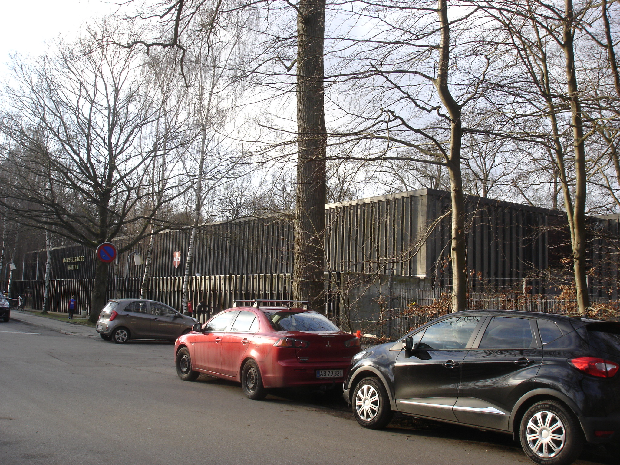 Marselisborghallen i Aarhus på Havreballe Skovvej, set fra øst